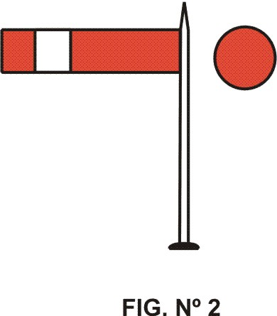 Es un dibujo de una señal de tren argentina, en posición horizontal, de peligro o vía bloqueada.